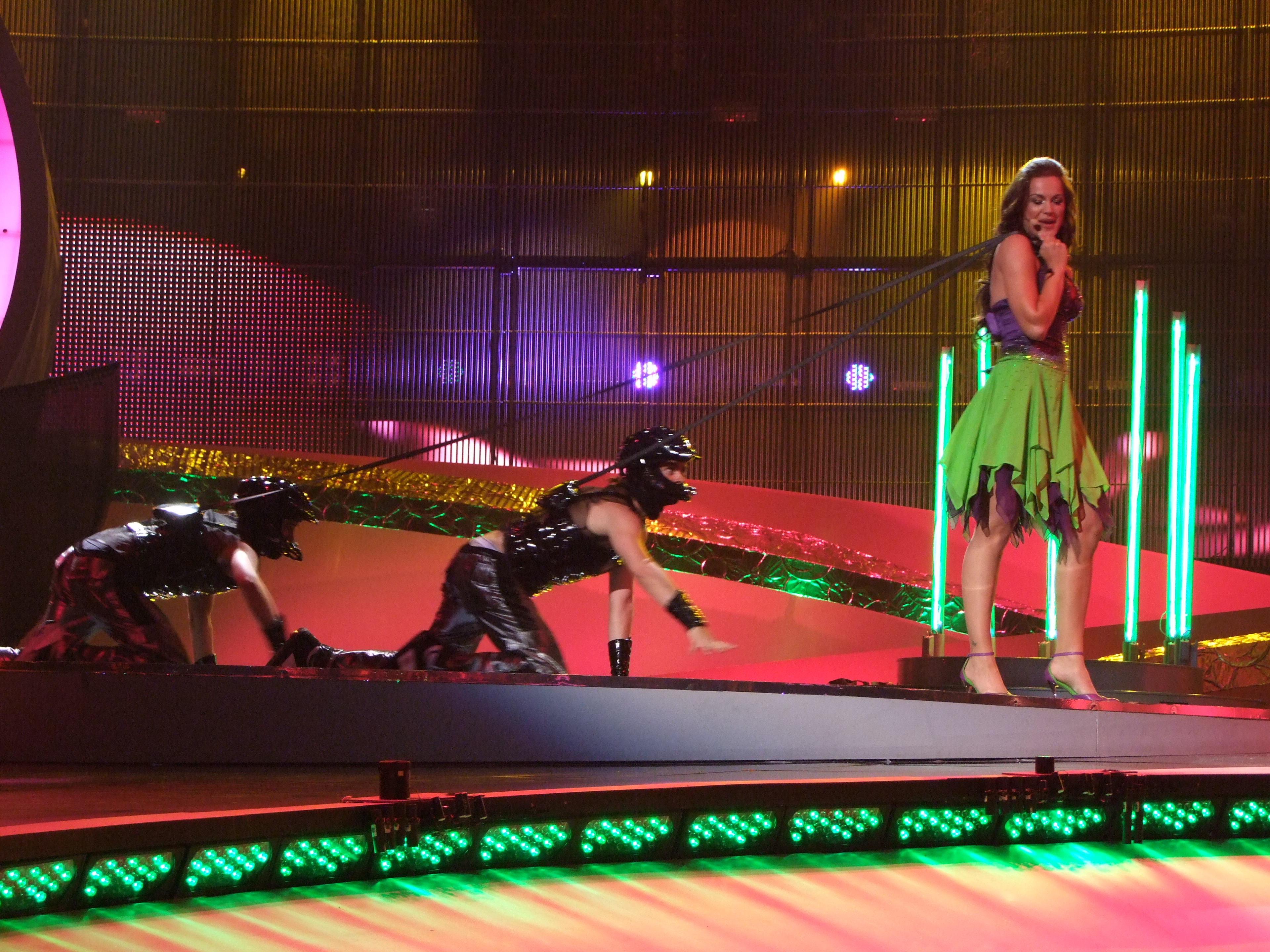 Eurovision Song Contest 2008, 1st semifinalSlovenia: Rebeka Dremelj - Vrag naj vzame